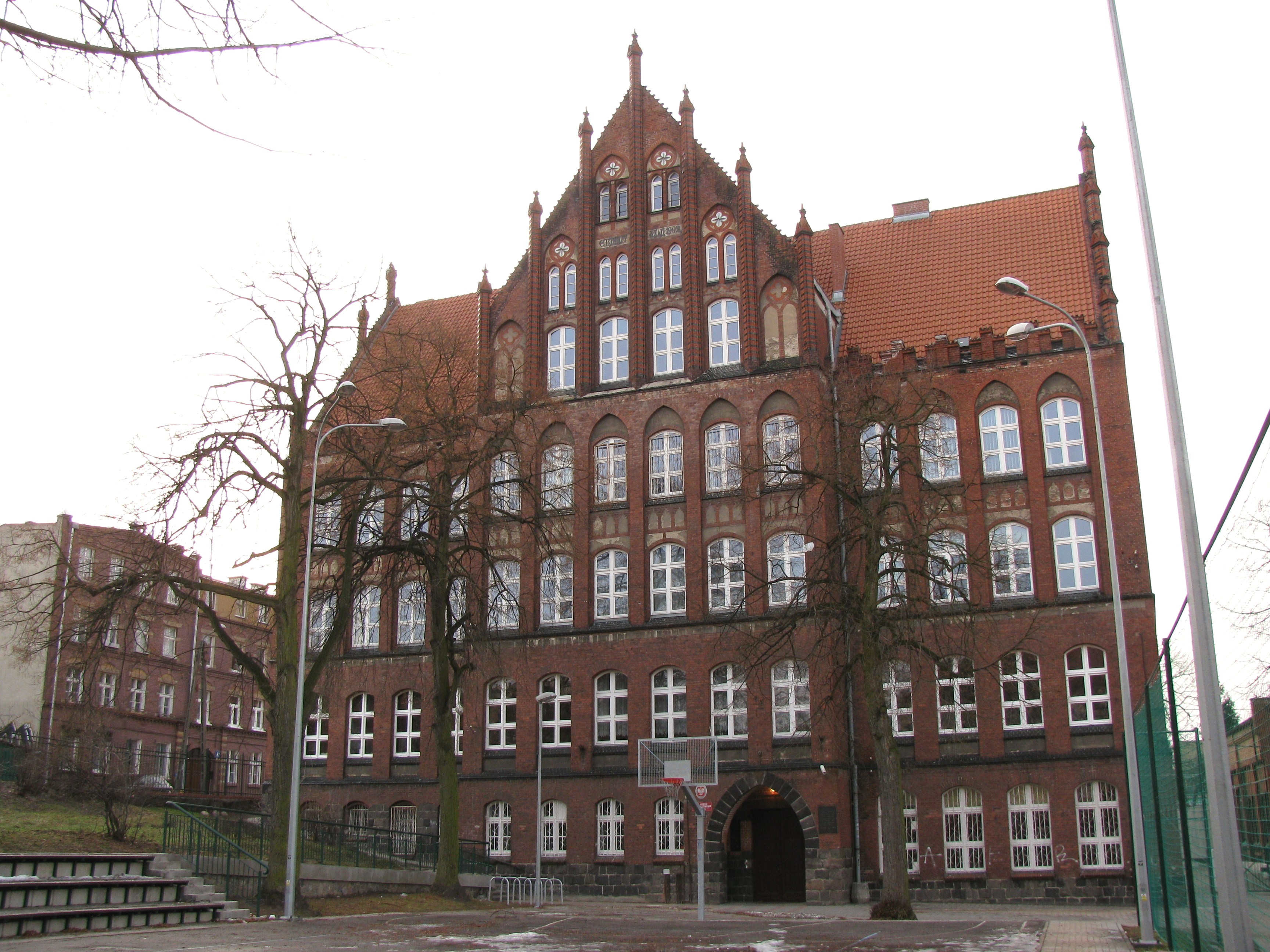 Kartuska 128 - VIII LO w Gdańsku.